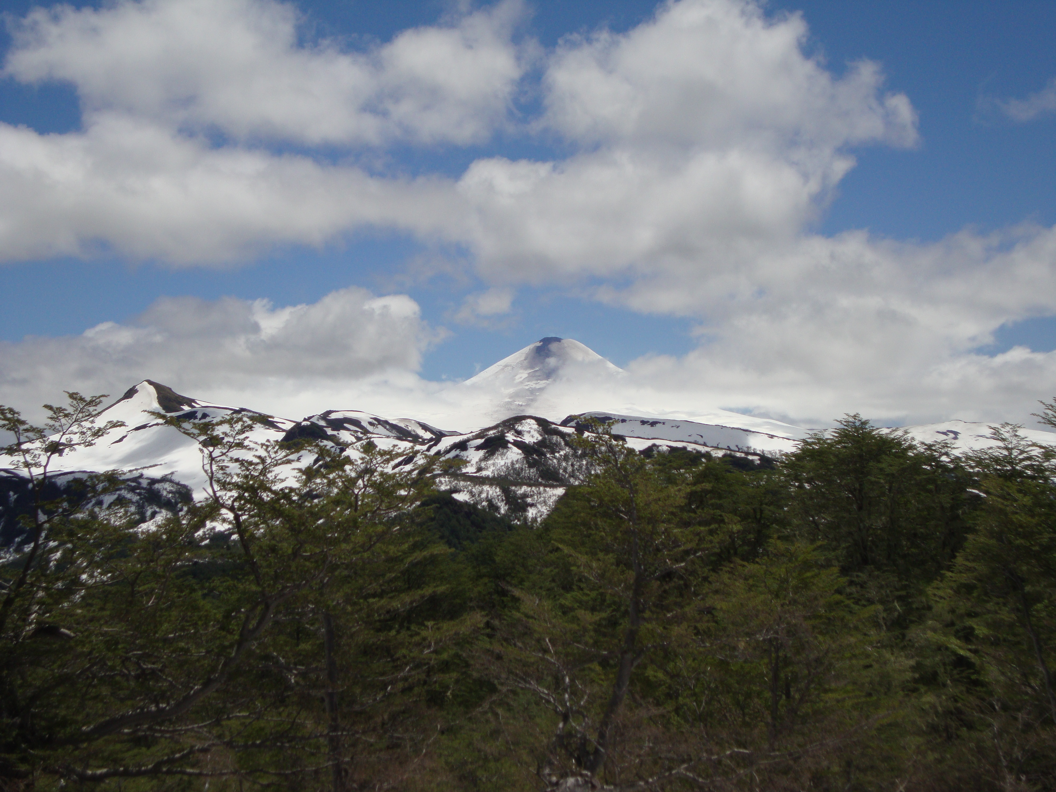 Villarrica nevado visto desde los lomajes del vn. Quetripillán en el sudeste.